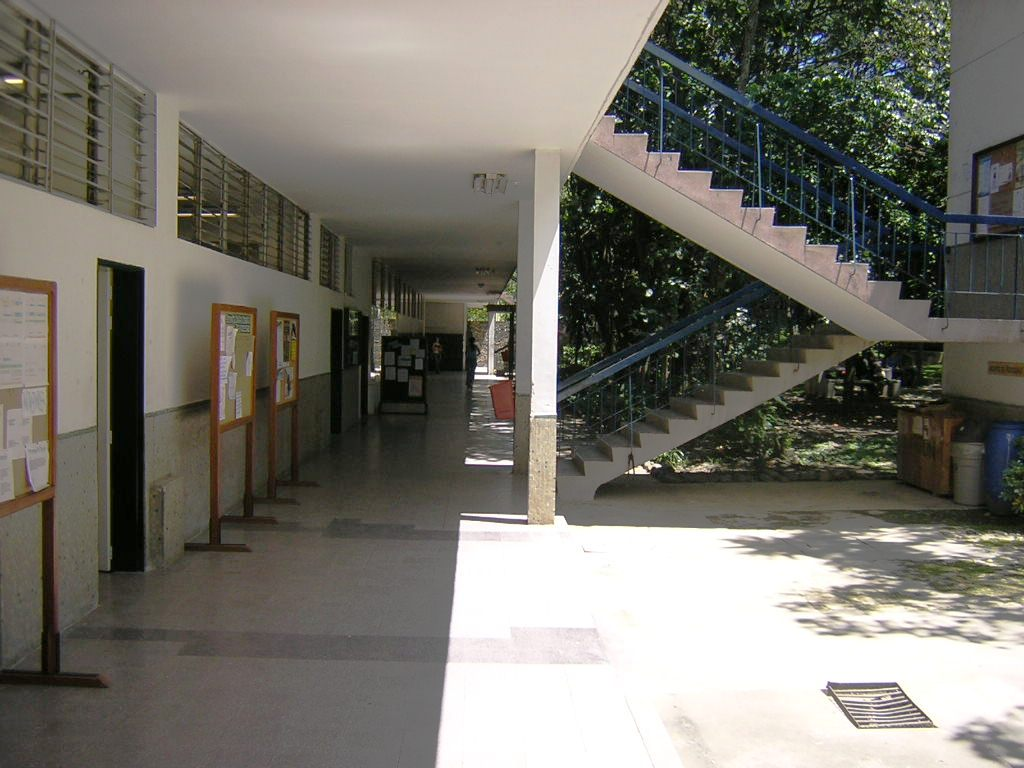 Bloque 44 Ciudadela Robledo, Universidad de Antioquia, Medellín, Colombia (esta foto la tome yo, y la libero al dominio público)